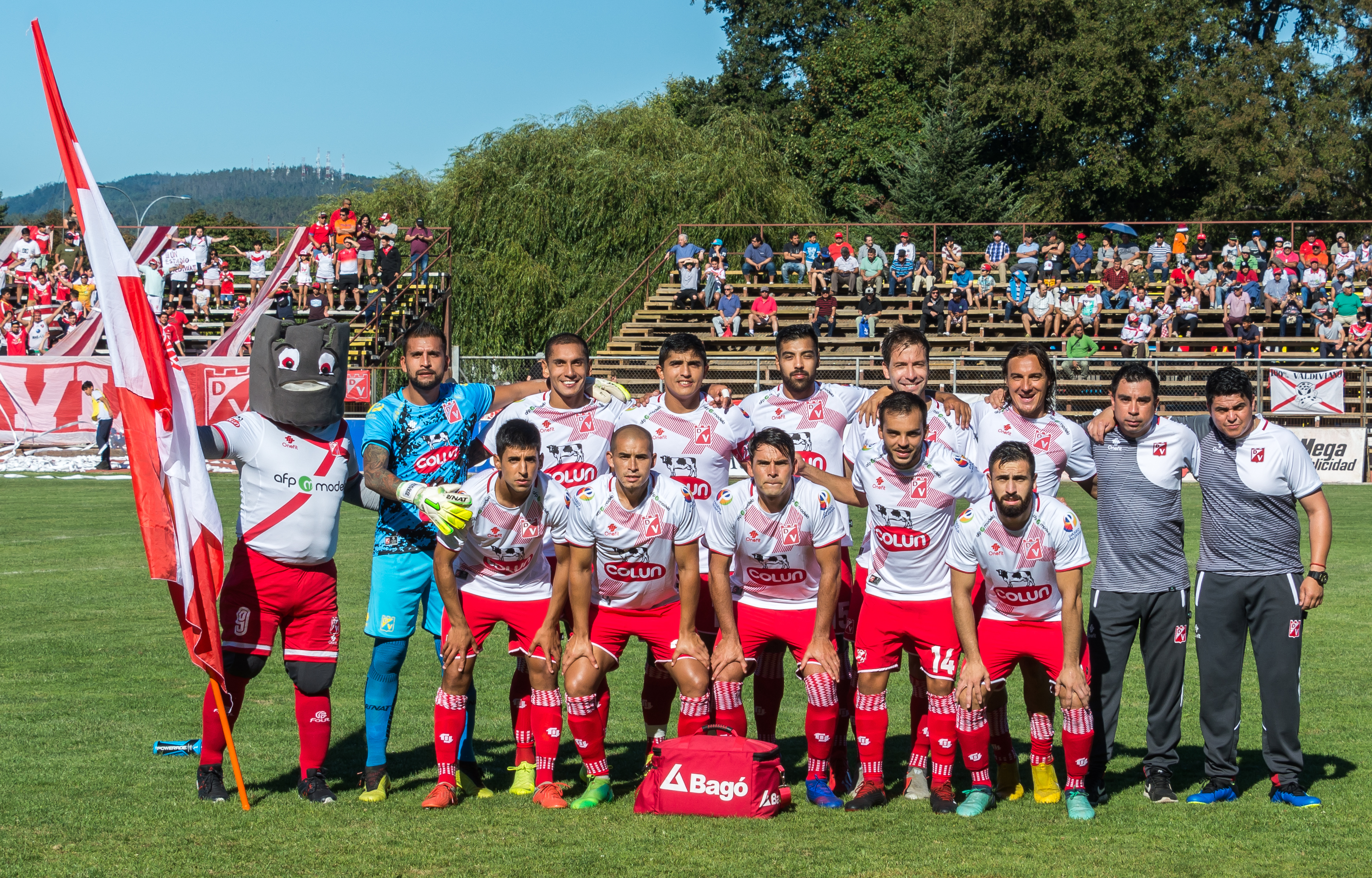 Deportes Valdivia v Deportes Santa Cruz, Estadio Parque Municipal, Valdivia, Región de Los Ríos, Chile.